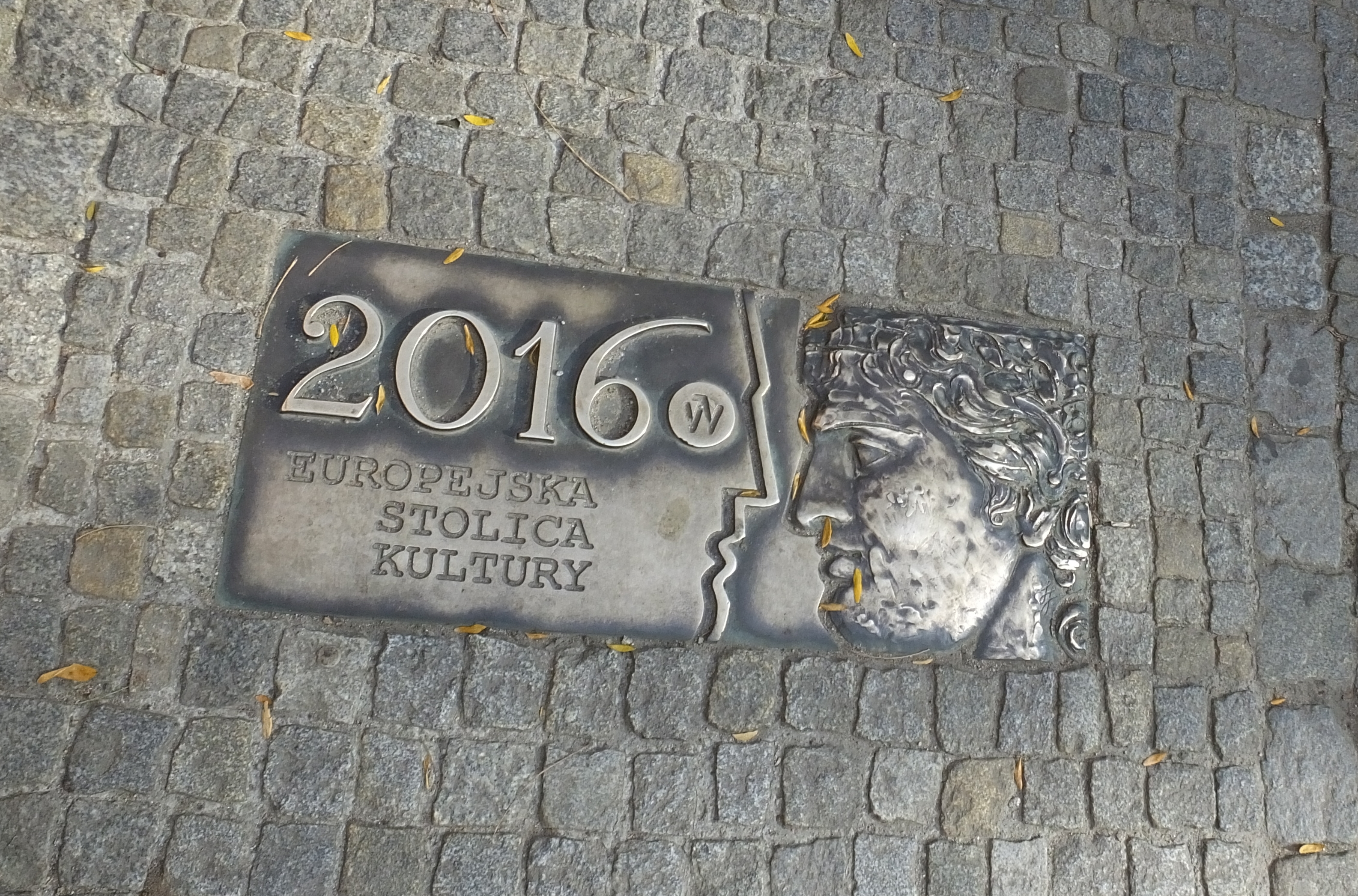 Ścieżka historii we Wrocławiu – Europejska Stolica Kultury 2016